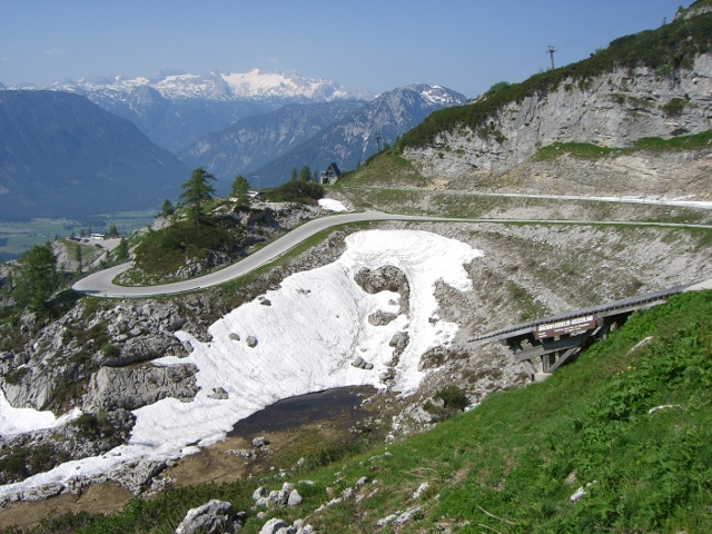 Blick von der Loser "Panoramastraße" - im Vordergrund Startplatz für Drachenflieger